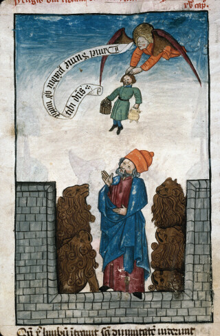 Daniel dans la fosse aux lions secouru par Habacuc. Ars moriendi. Marseille - BM - ms. 0089 (f. 029)